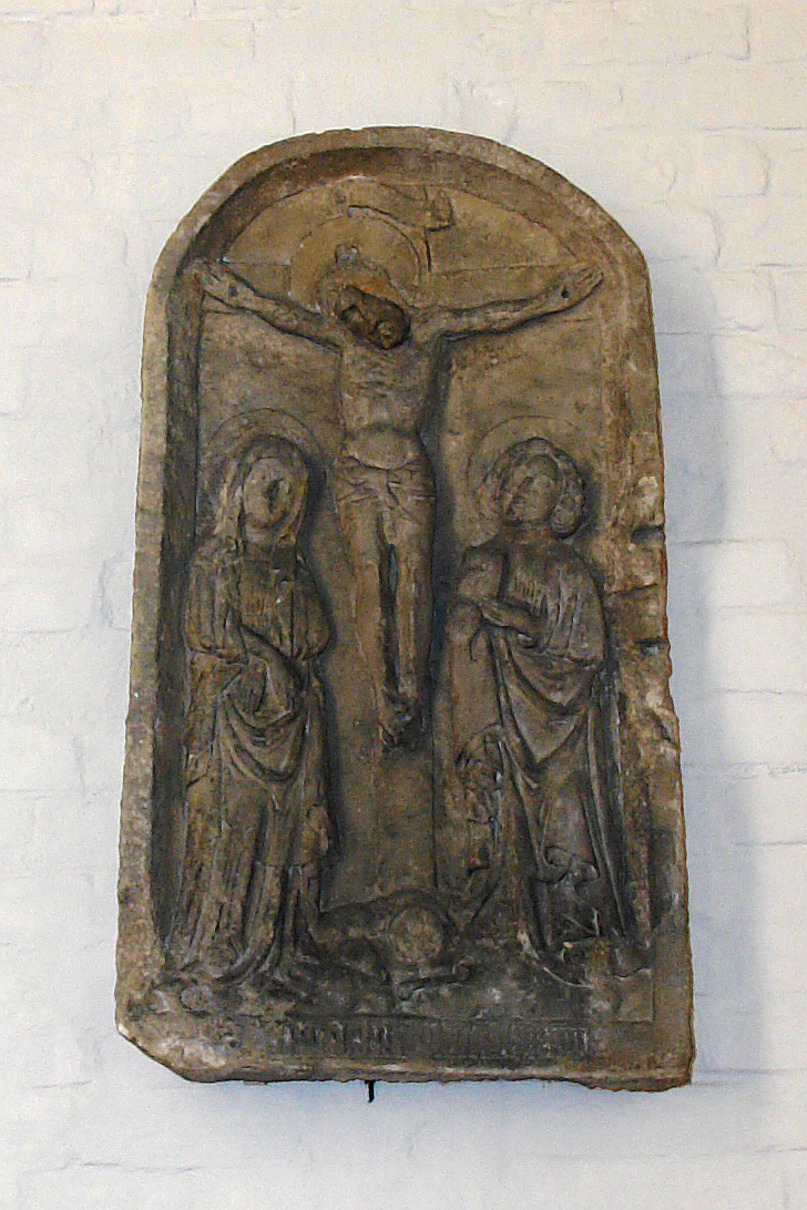 St.Martini-Kirche in Bremen. Kreuzigungsgruppe aus Sandstein (um 1440)